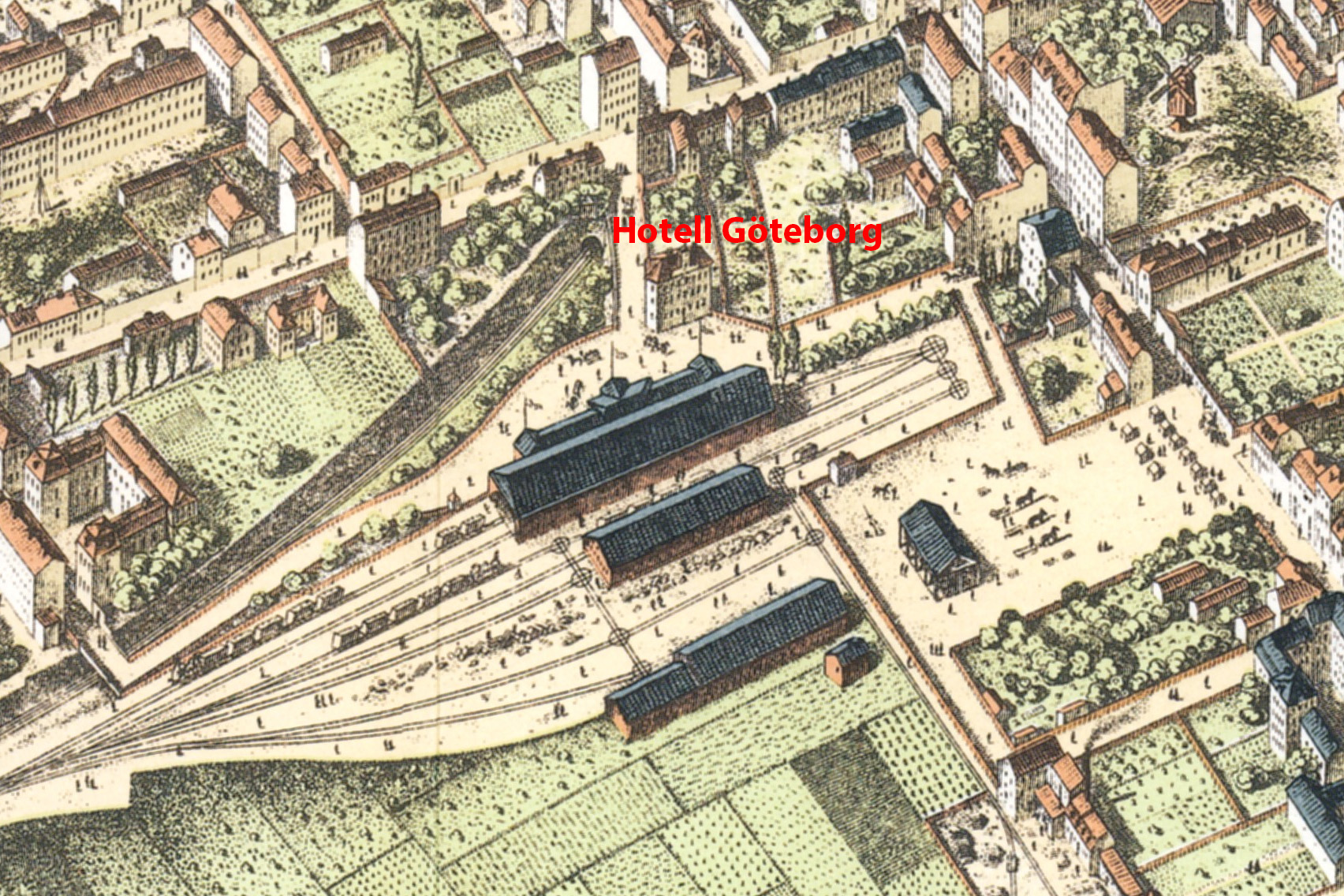 Del av Neuhaus panoramakarta över Stockholm, del av norra Södermalm, Hotell Göteborg utmärkt